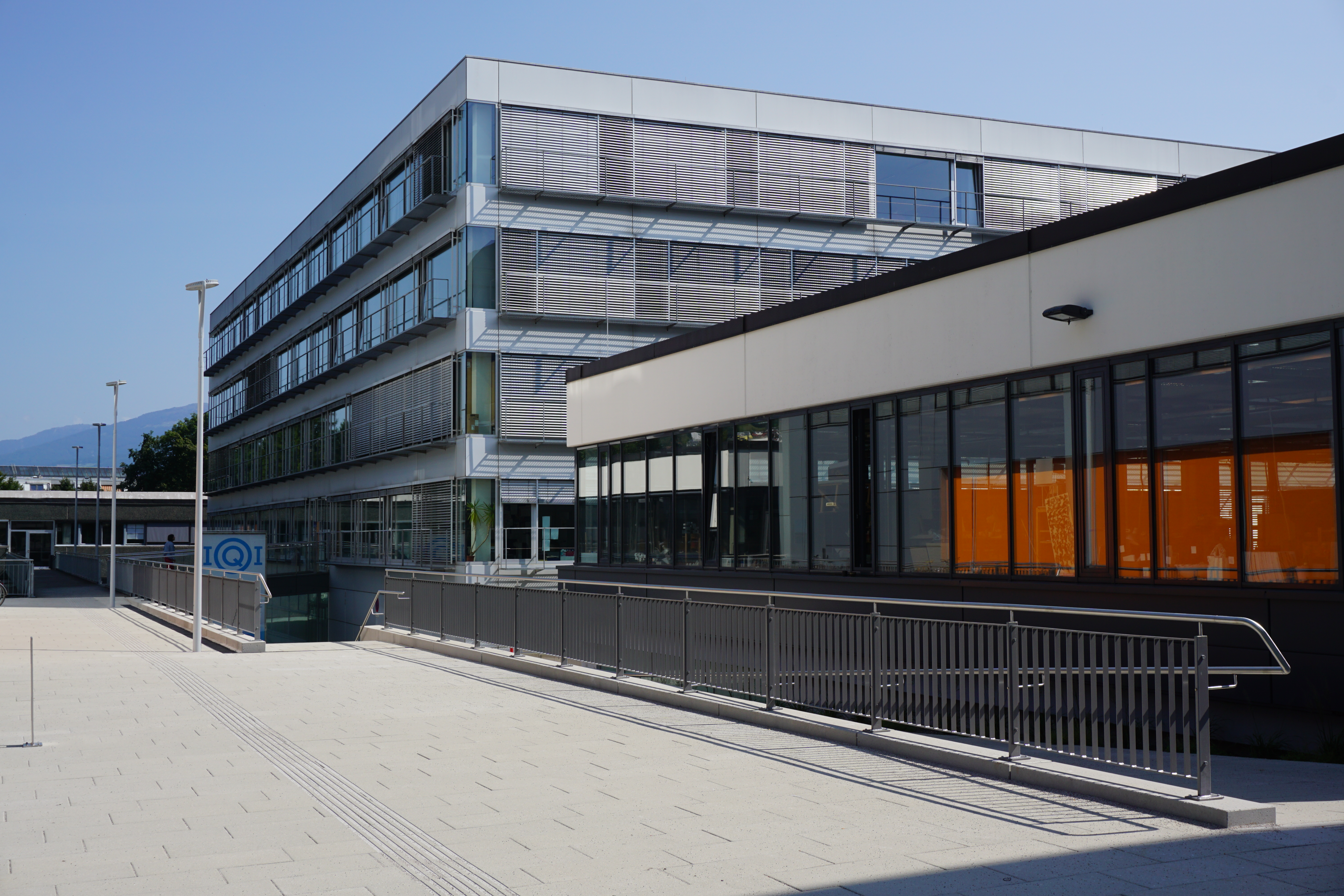 Campus Technik der Universität Innsbruck. IQI. ICT-Gebäude.